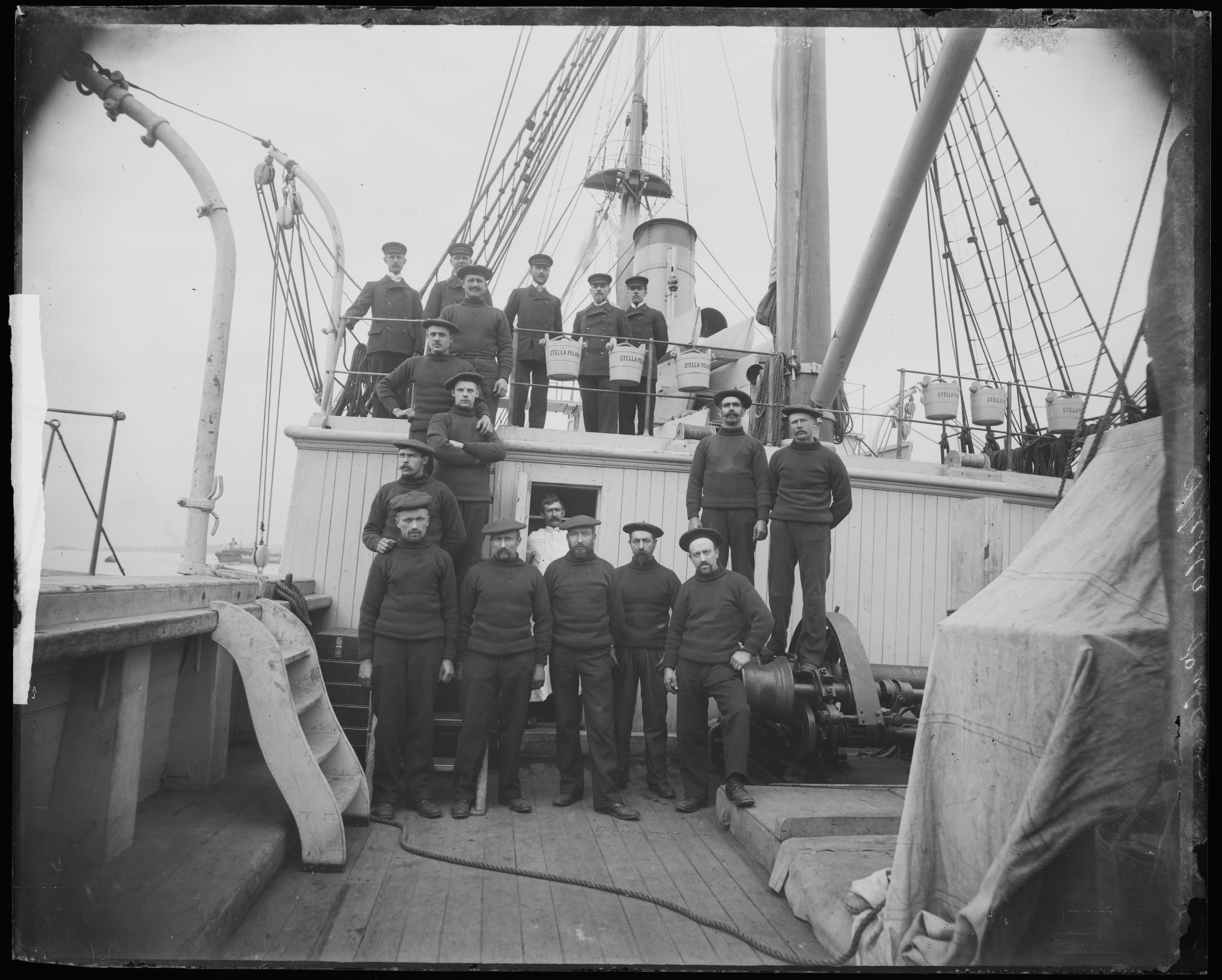 Bildet er hentet fra Nasjonalbibliotekets bildesamling. Anmerkninger til bildet var: Påskrift arkivark: Stella Polare, Manskab Eldste arkivnummer: 321 Oslo, Oslo